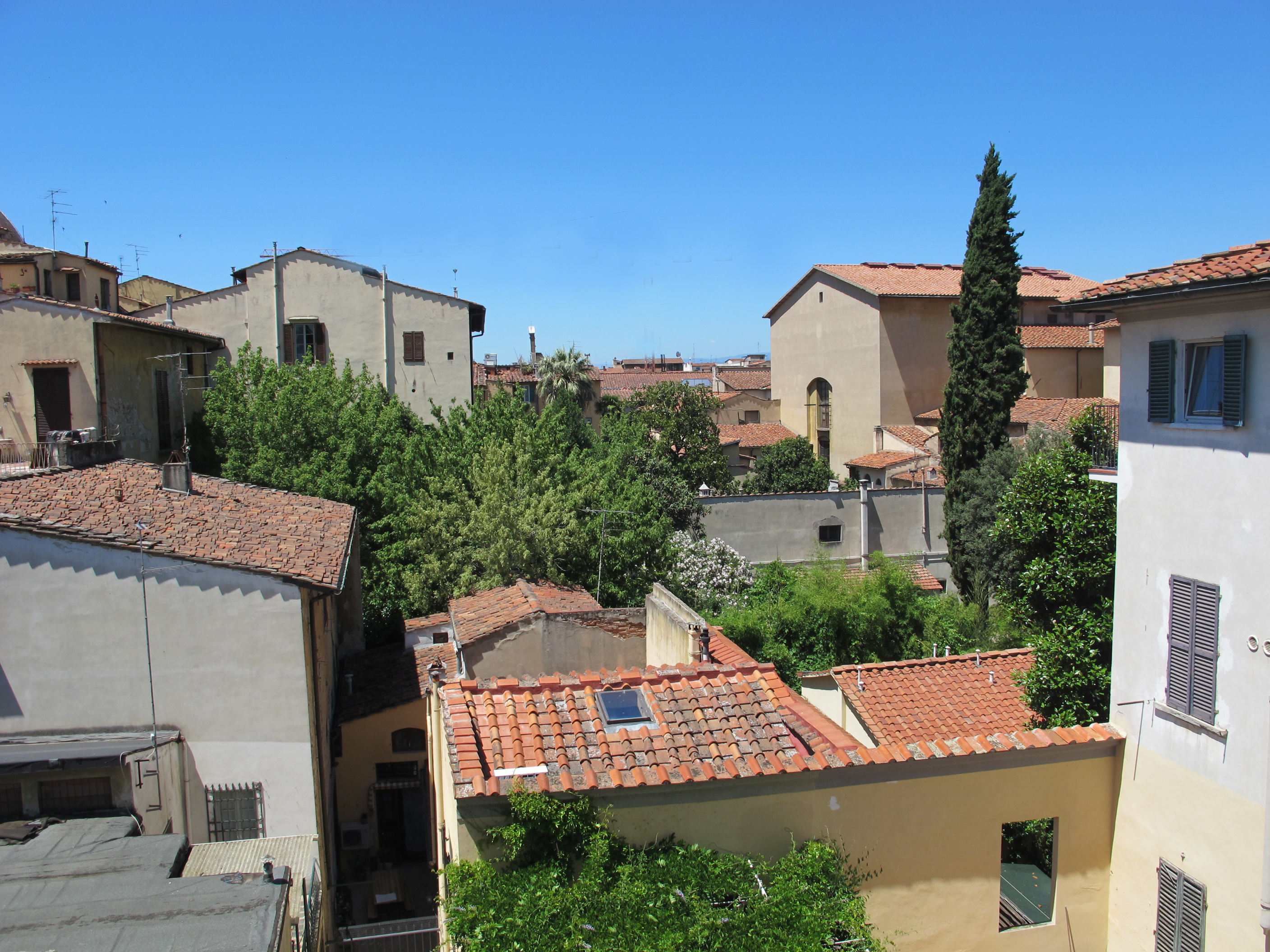 Ex-teatro nuovo di via bufalini, firenze